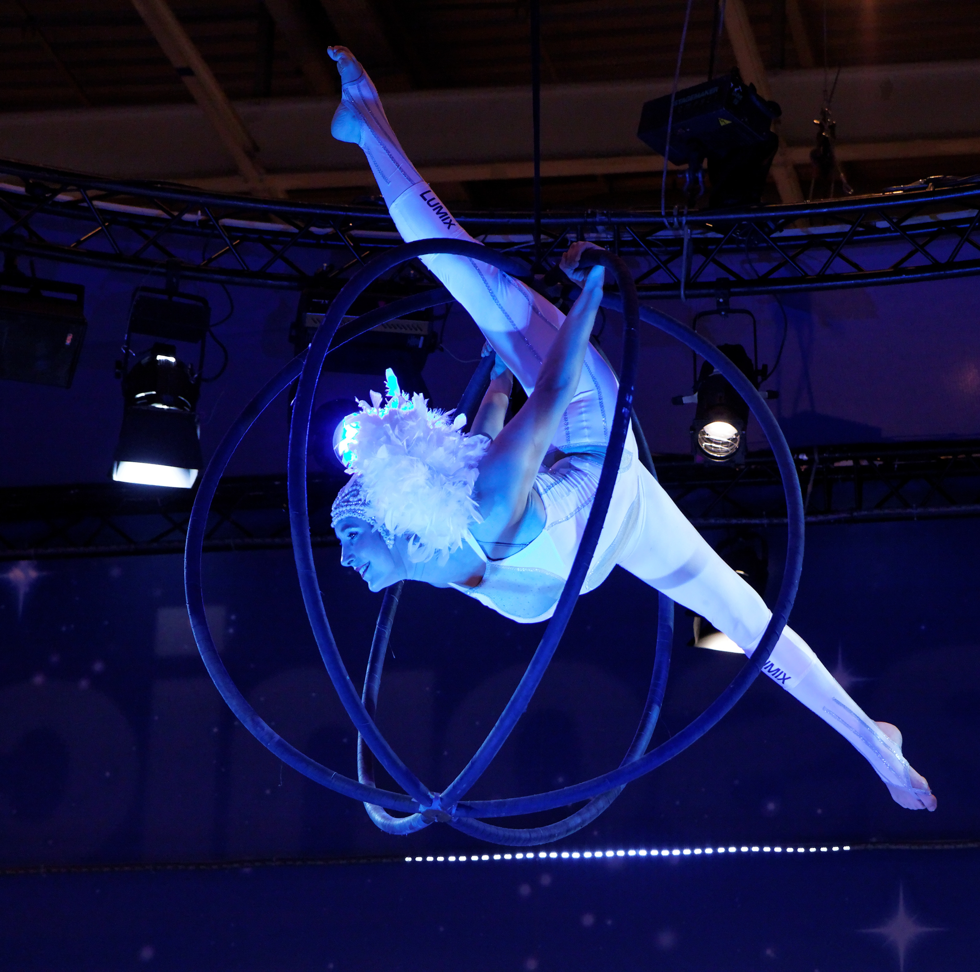 Acrobaties aériennes sur le stand Panasonic lors du salon de la photo 2010 de Paris.